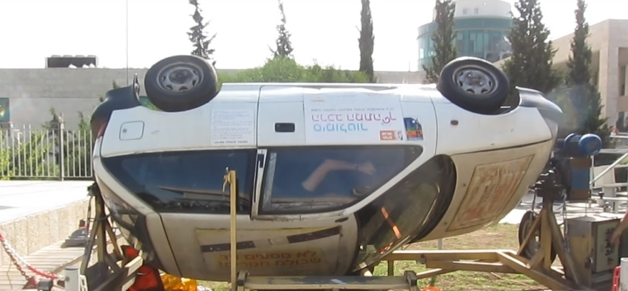 סימולטור הרכב המתהפך - חגורת הבטיחות מגנה מפני טלטול ופליטה מהרכב